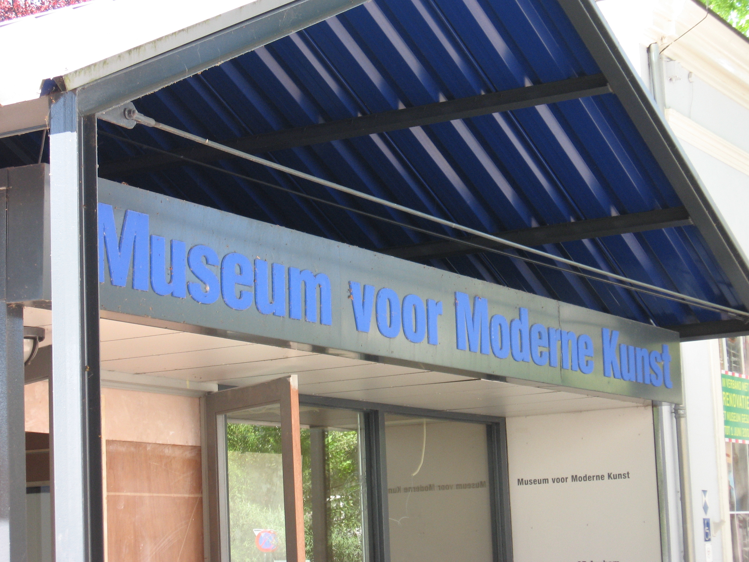 Museum in verbouwing.